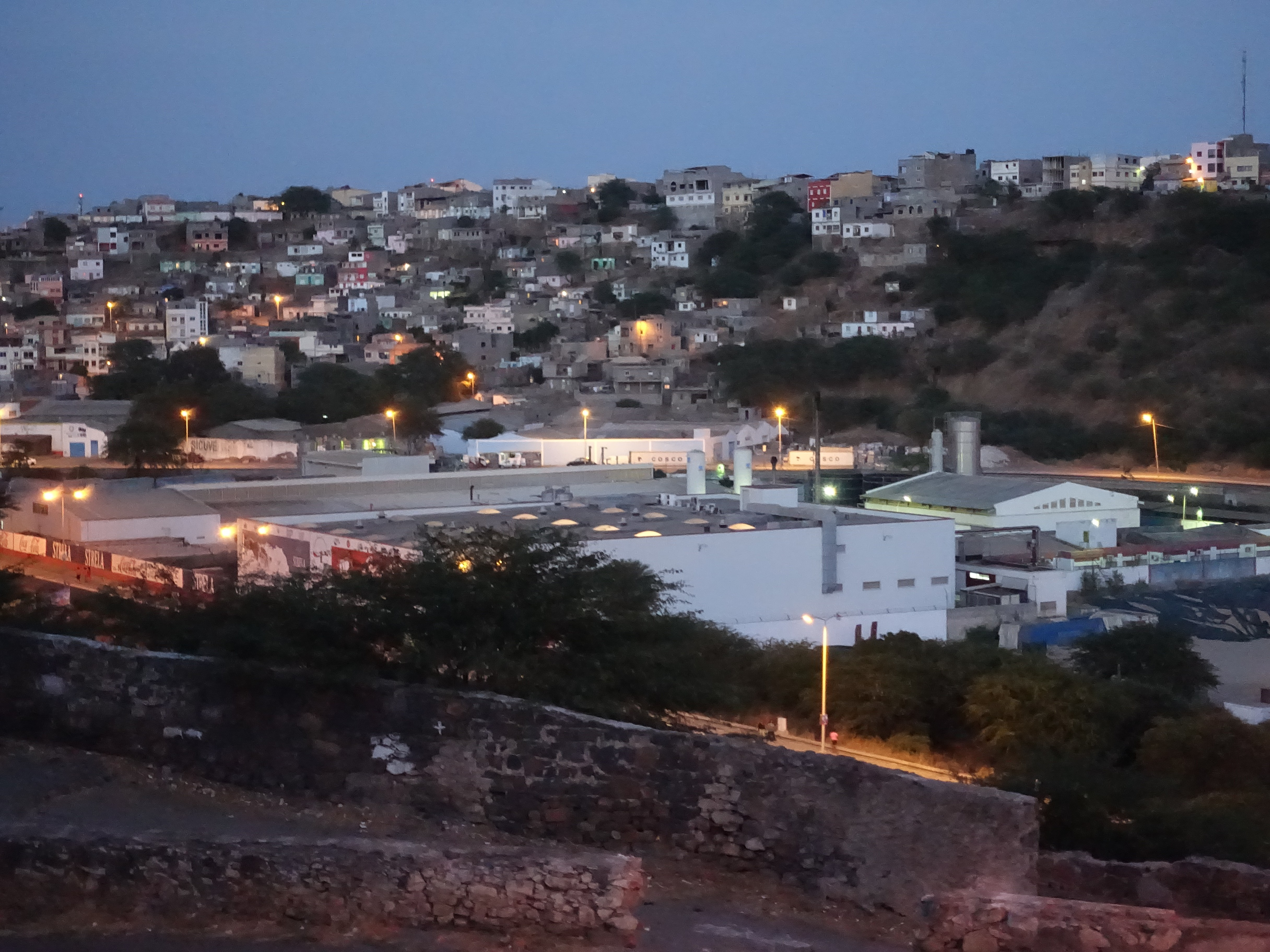 Praia - Stadtteil abends